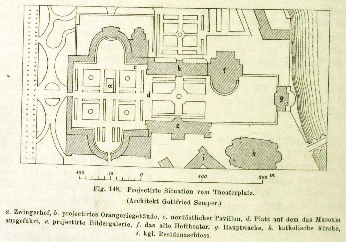 siehe Bildtext aus: Die Bauten, technischen und industriellen Anlagen von Dresden. Herausgegeben vom Sächs. Ingenieur- und Architekten-Verein und vom Dresdener Architekten-Verein. Meinhold, Dresden 1878